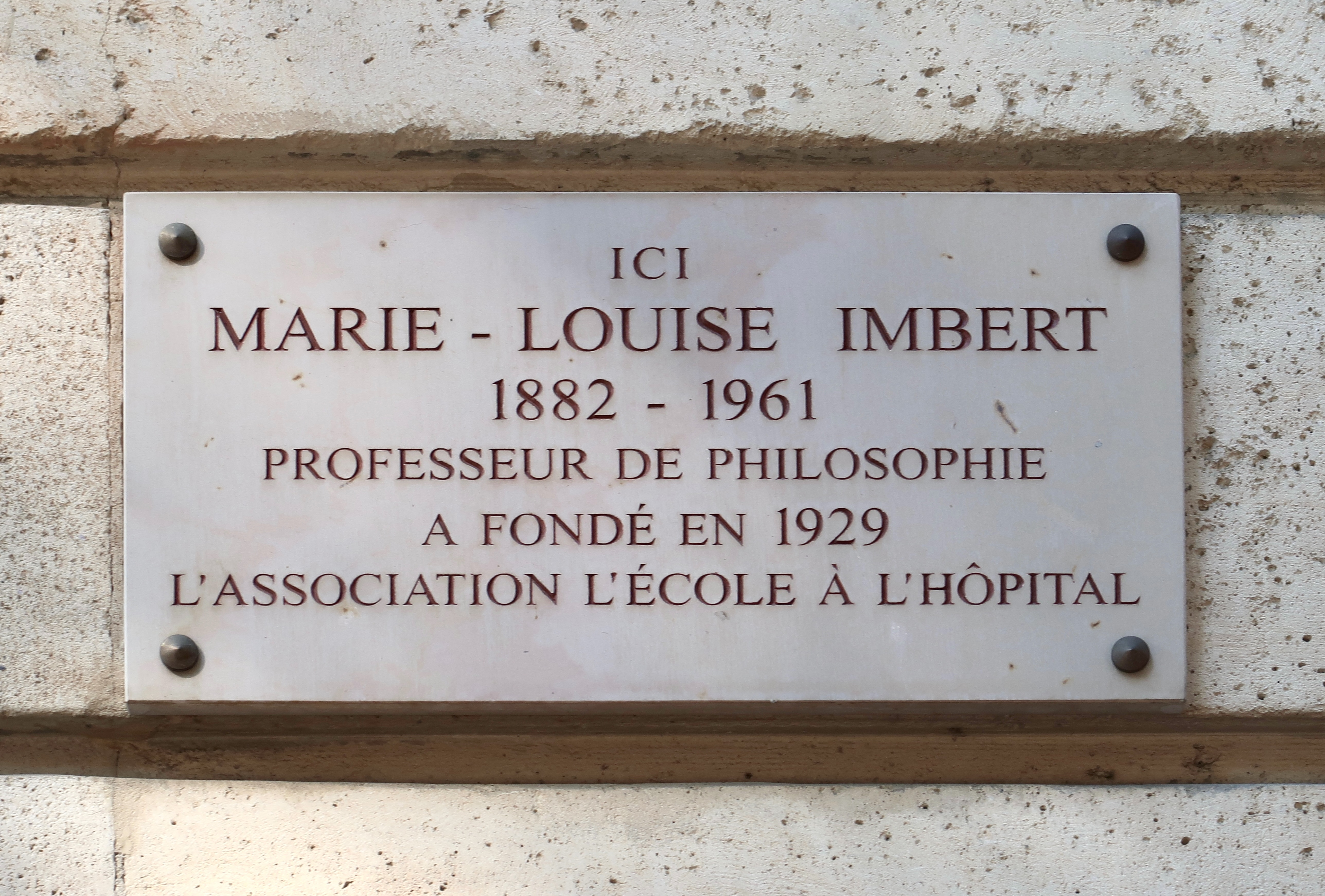 Plaque en hommage à Marie-Louise Imbert, 145 boulevard du Montparnasse (Paris 6e).